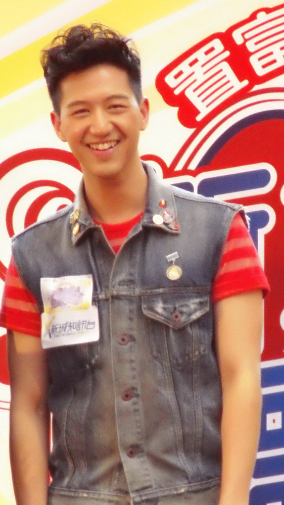 中文（香港）: 馮允謙的樣子